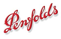 Penfolds